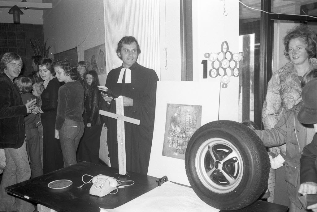 Pastor Helge Adolphsen hat auf einem improvisierten Altar im Haus der Begegnung an der Johannisburger Straße ein Telefon und ein Reserverad aufgestellt. Die vier Neumühlen-Dietrichsdorfer Pastoren haben zu einer ungewöhnlichen Form des Gottesdienstes aufgerufen, um auch Nicht-Kirchgänger und Außenstehende für das Leben in der Gemeinde zu interessieren.